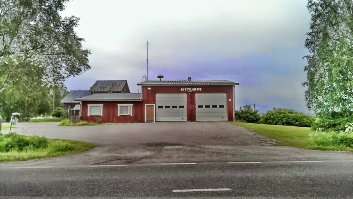 Ryttylän VPK-rakennus